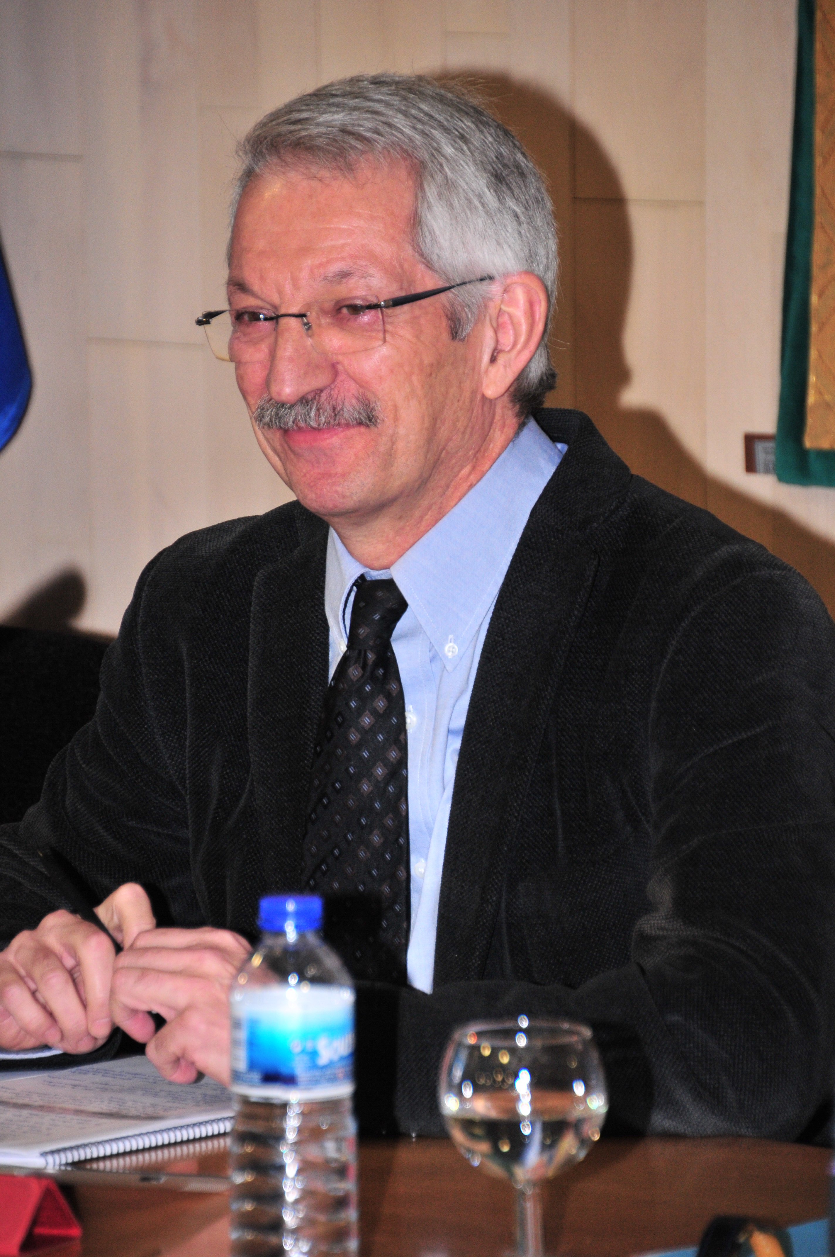 Debate electoral 30-5-13(14)